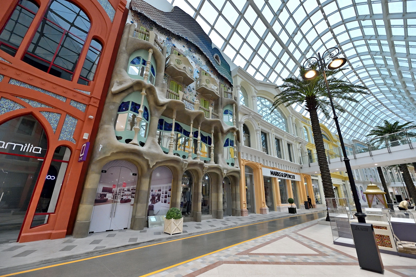 Владимир Путин и Сергей Собянин посетили новый парк развлечений «Остров Мечты»